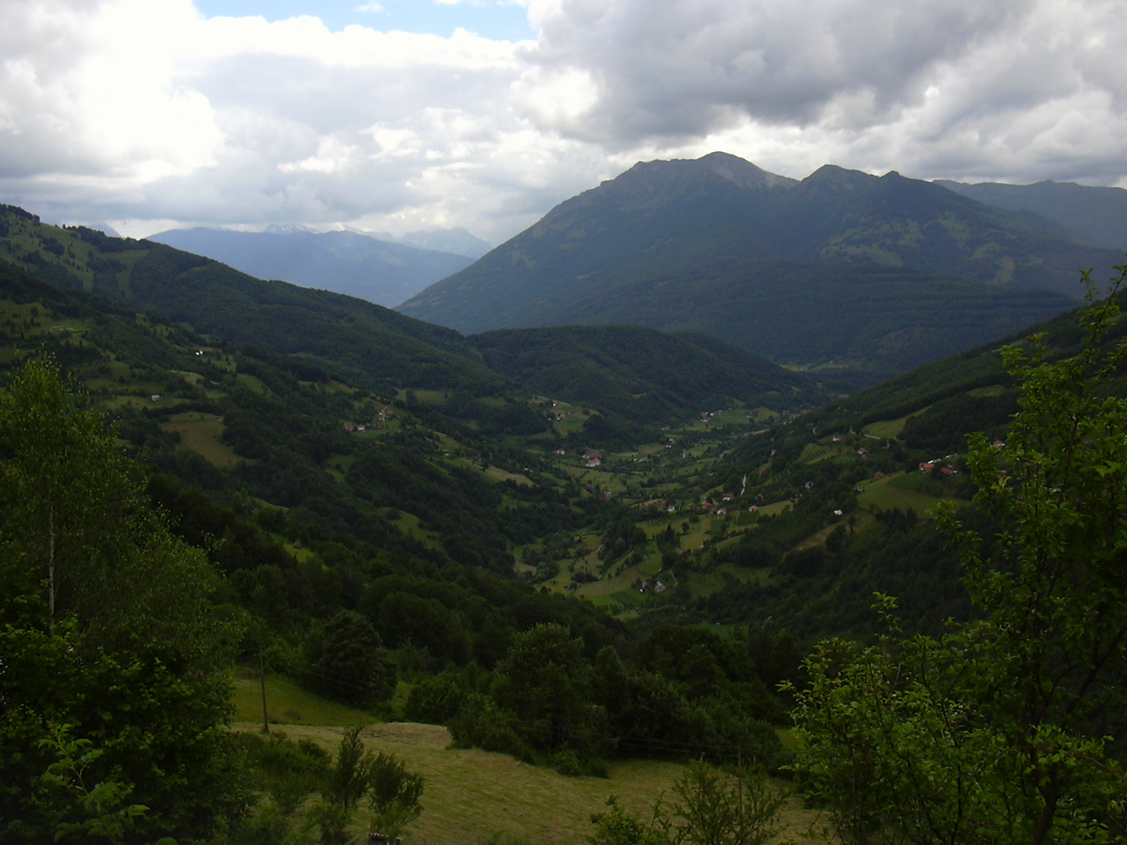 elika- sa Cakora